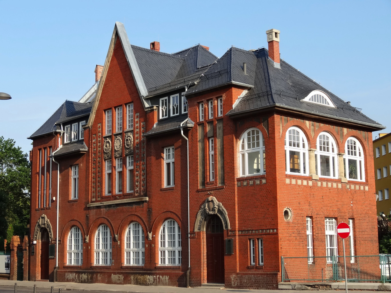 Budynek dawnej ochronki dla dzieci, zbud. 1908-1909, ob. siedziba Wojewódzkiego Ośrodka Kultury "Stara Ochronka" w Bydgoszczy pl. Kościeleckich 6